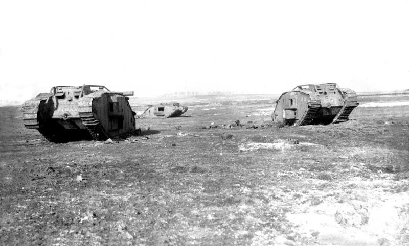 I. Weltkrieg 1914-1918 Moenvres Gruppe von Tanks